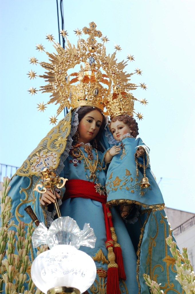 La Virgen del Socorro durante su procesión